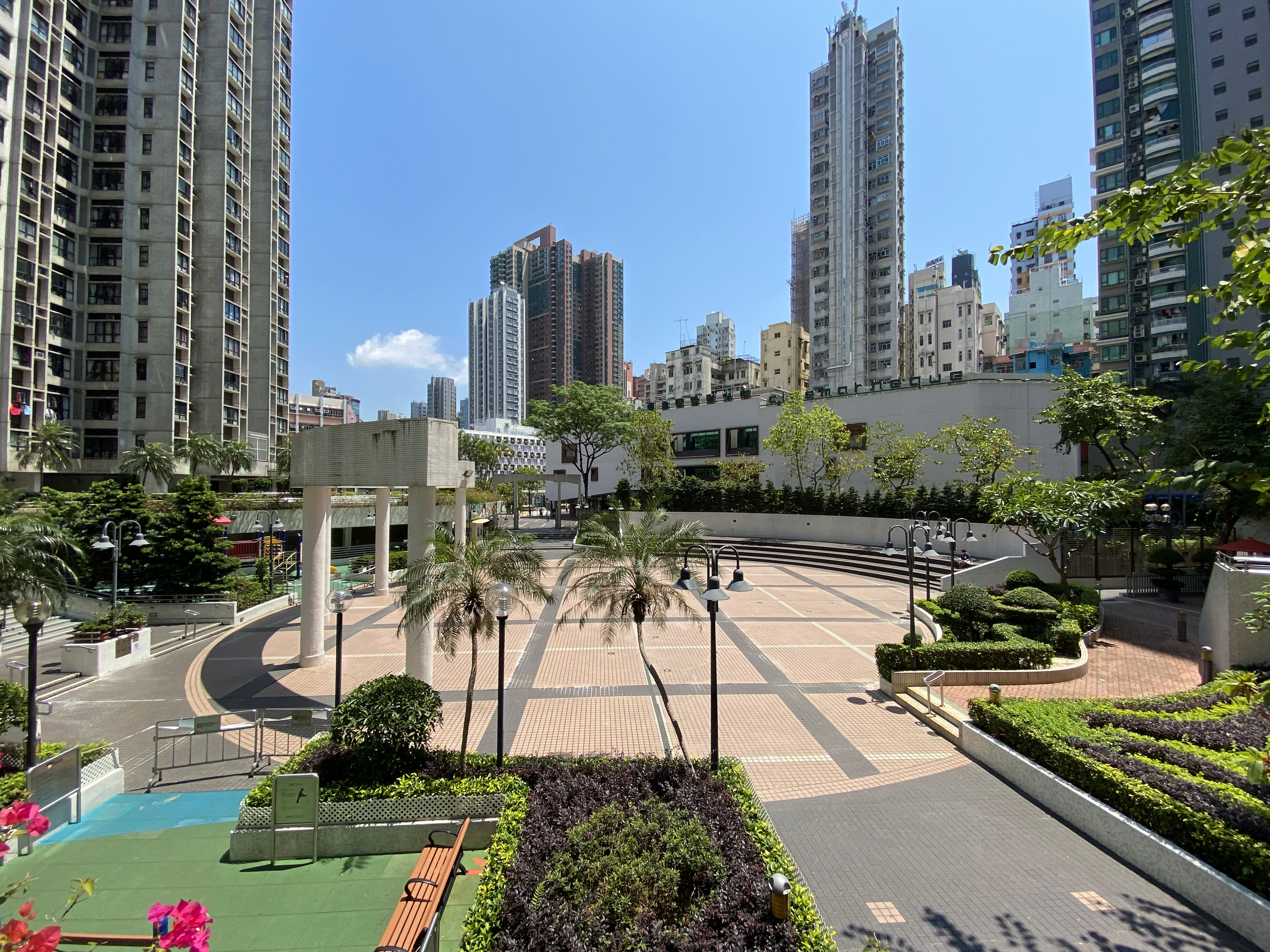 Prosperous Garden Open space